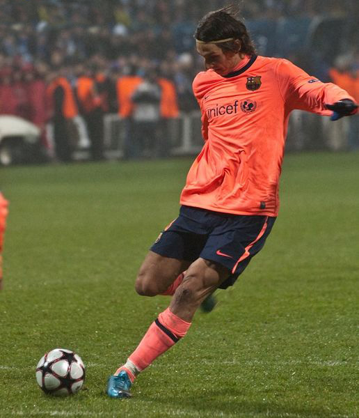 Zlatan Ibrahimovic, en un partido frente al Dynamo de Kiev.